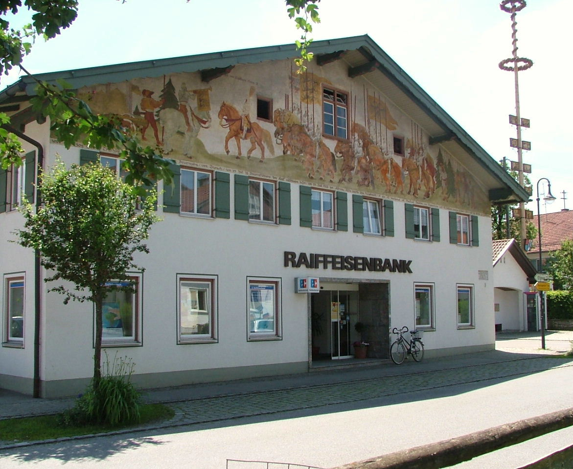 Aitrang, Raiffeisenbank-Filiale (Lindenstr. 32).